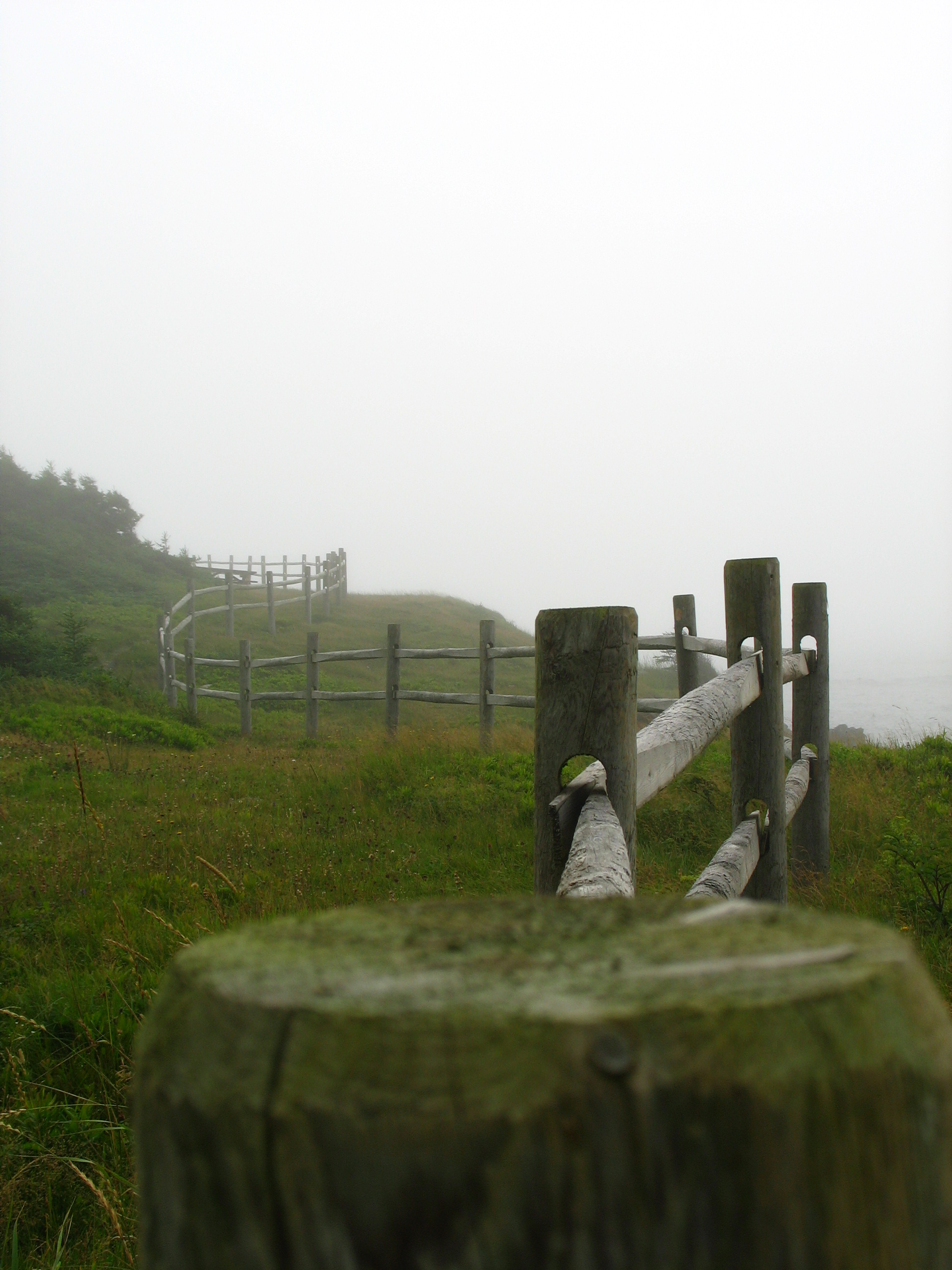 fence, cloture, point michaud nova scotia